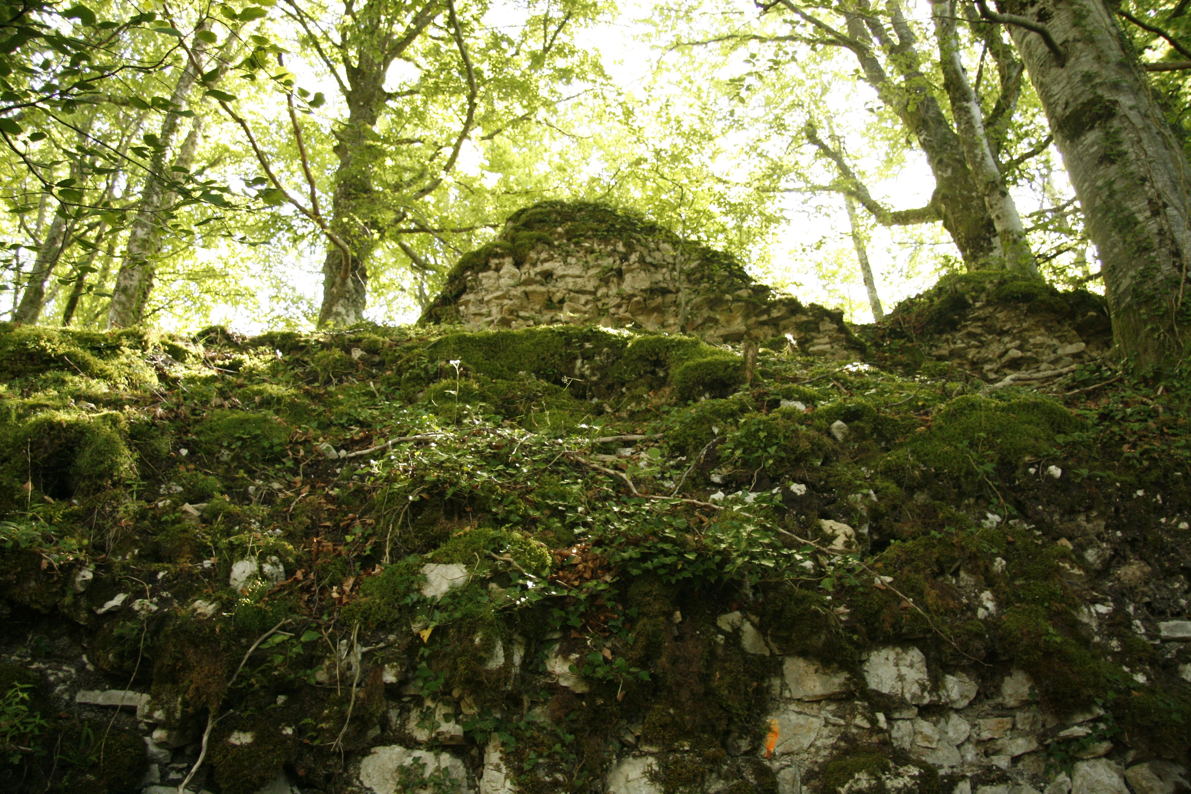 Chateau de rougemont muraille sud